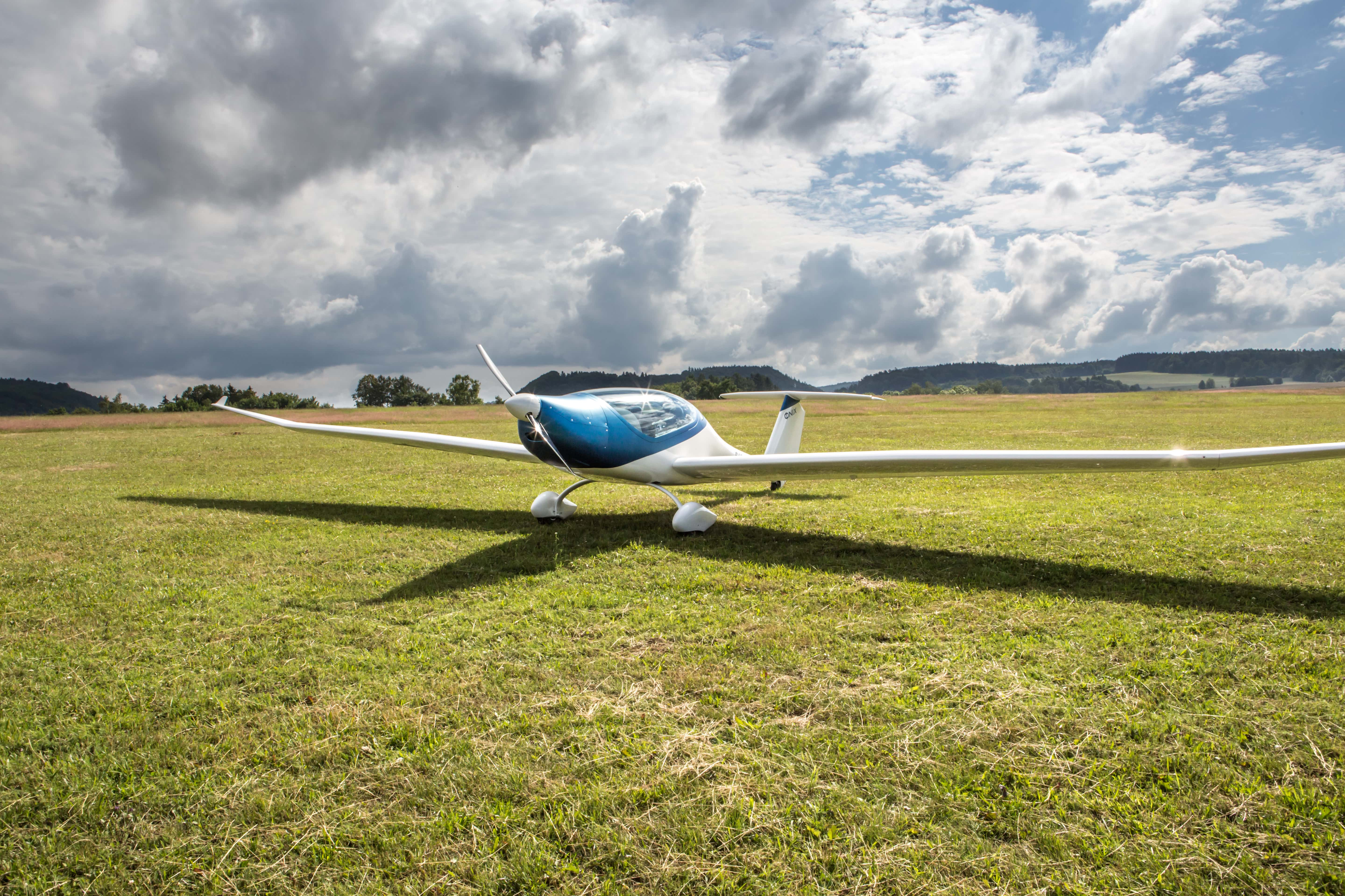 Čistě elektrické letadlo ΦNIX